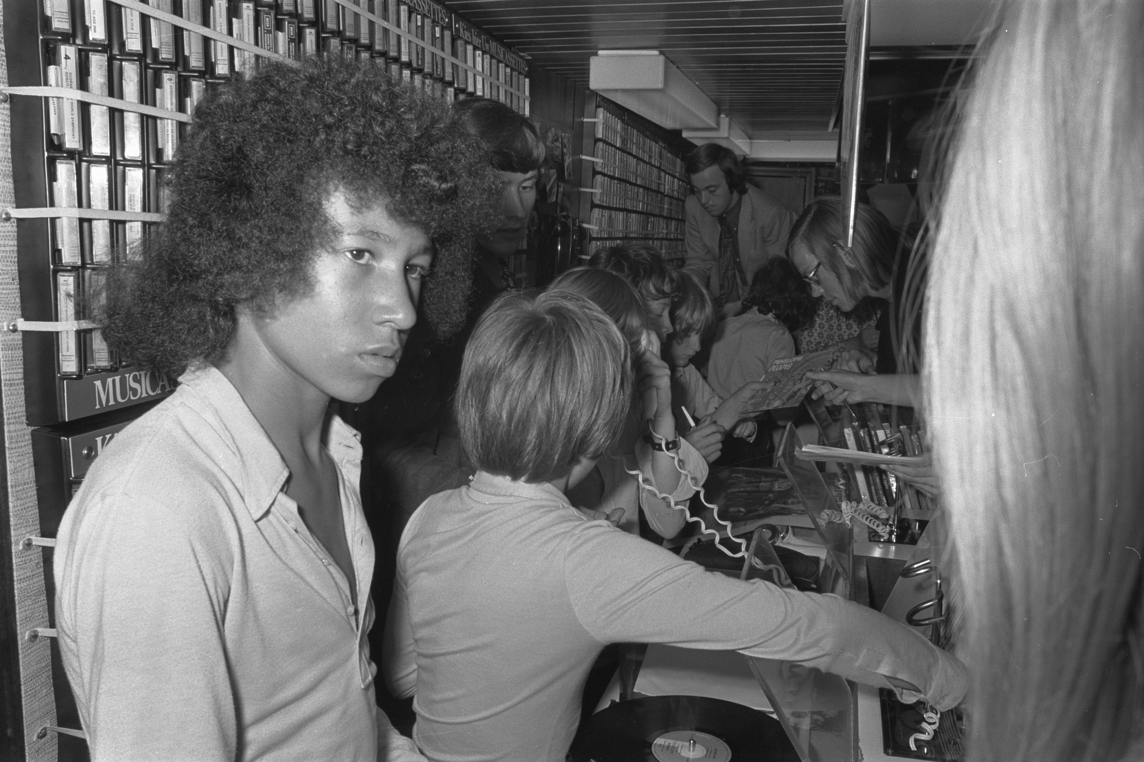 Franse zanggroep Les Poppys geeft handtekeningen in platenzaak van Willy Alberti in Amsterdam, 10 augustus 1972. Links: Bruno Polius